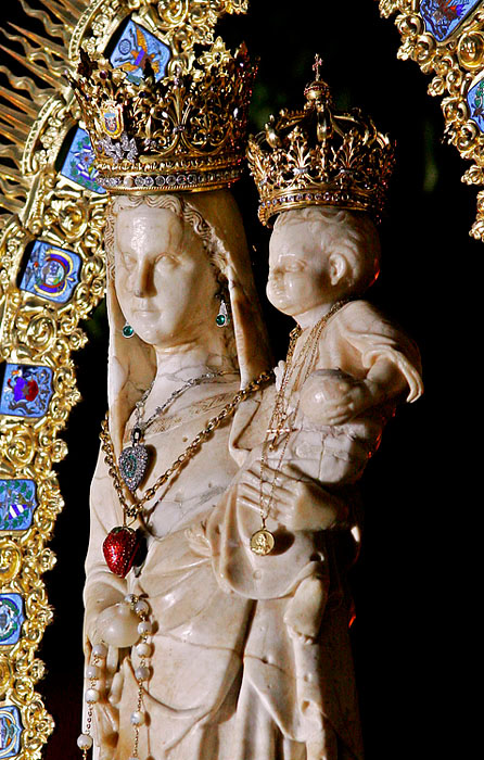 Ntra. Señora de los Milagros. Patrona de Palos de la Frontera.